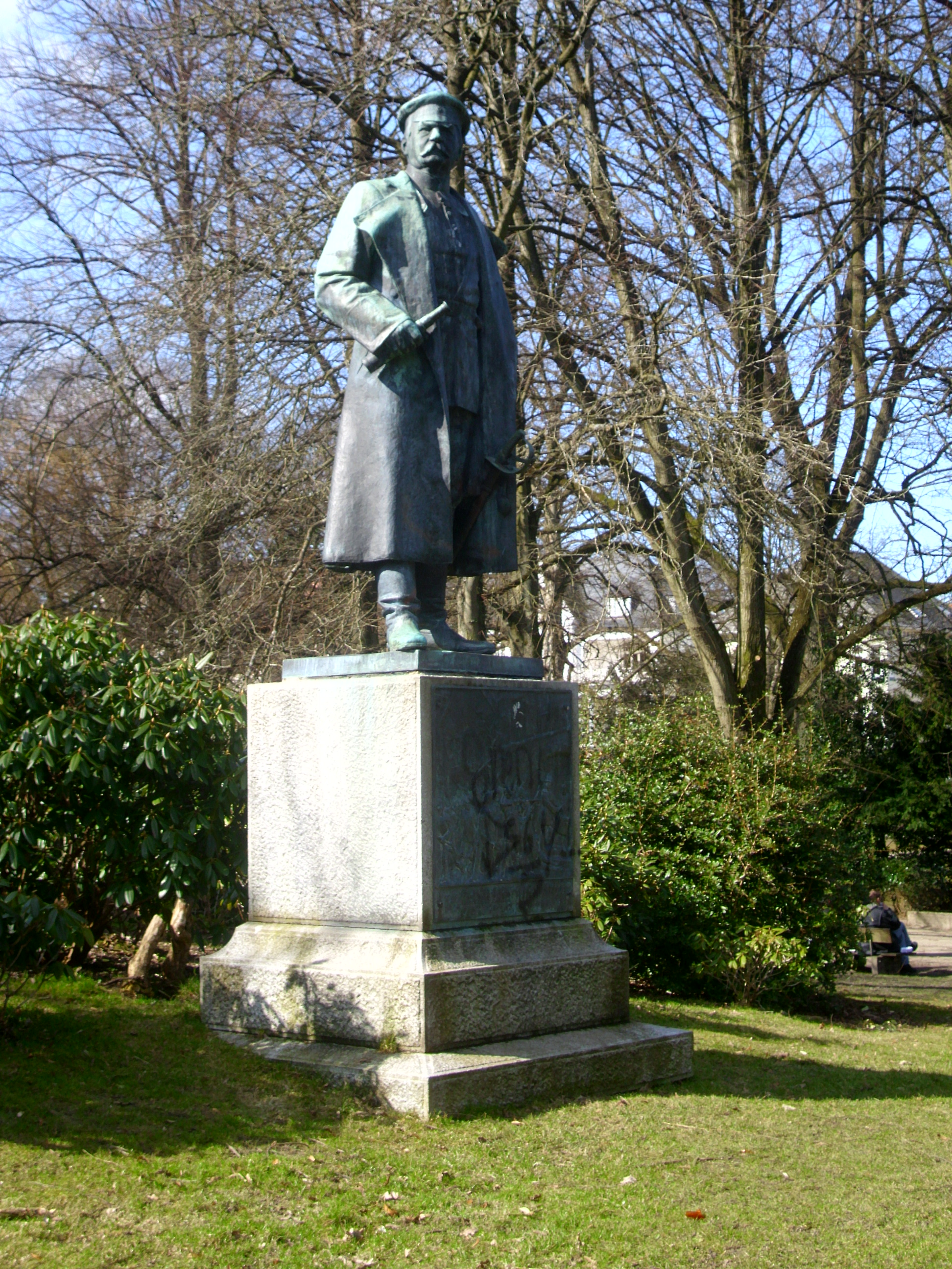 Wrangel Statue, Stadtpark Flensburg; damals mit beschmierten Relief